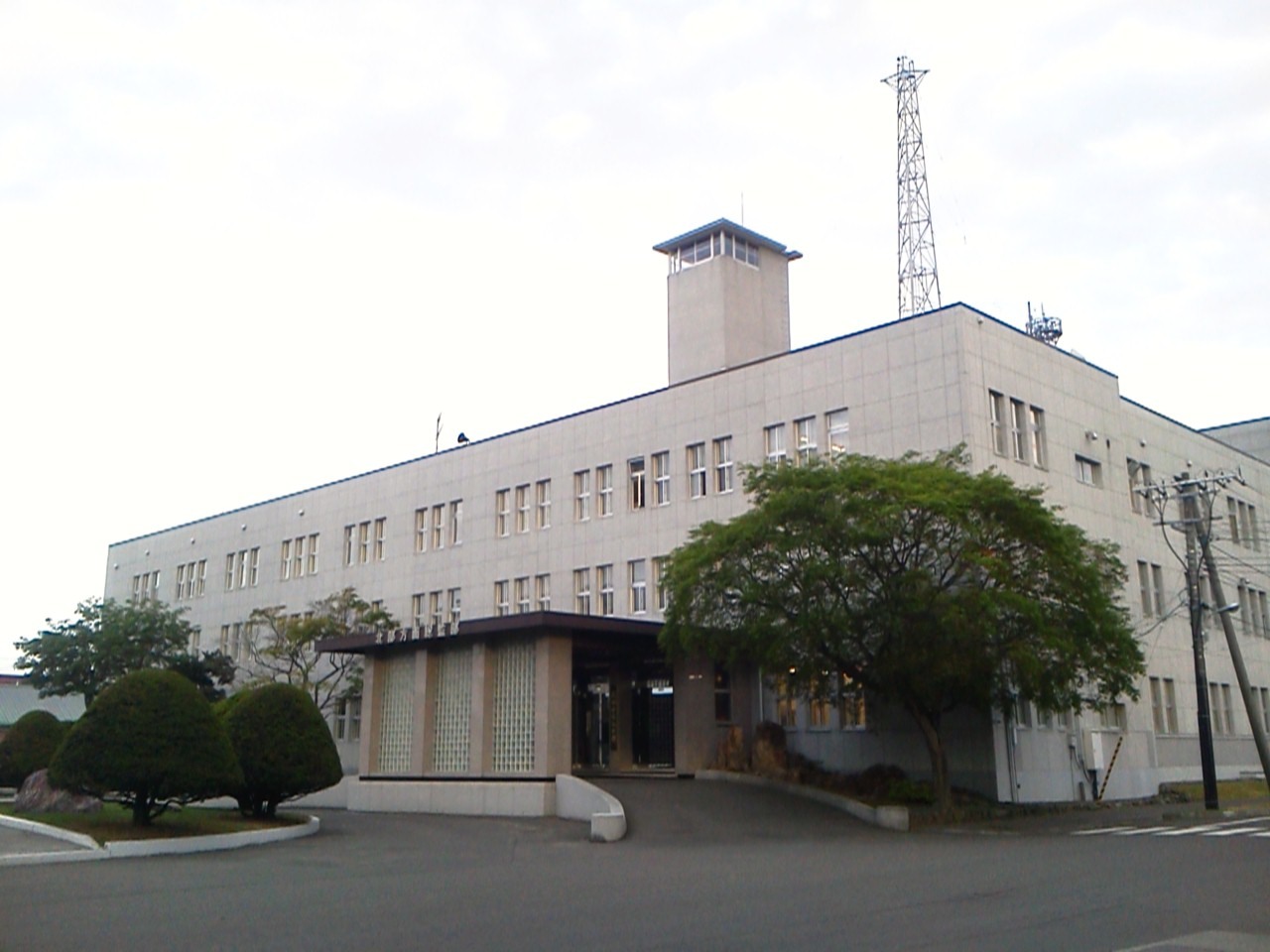 北部方面総監部建物